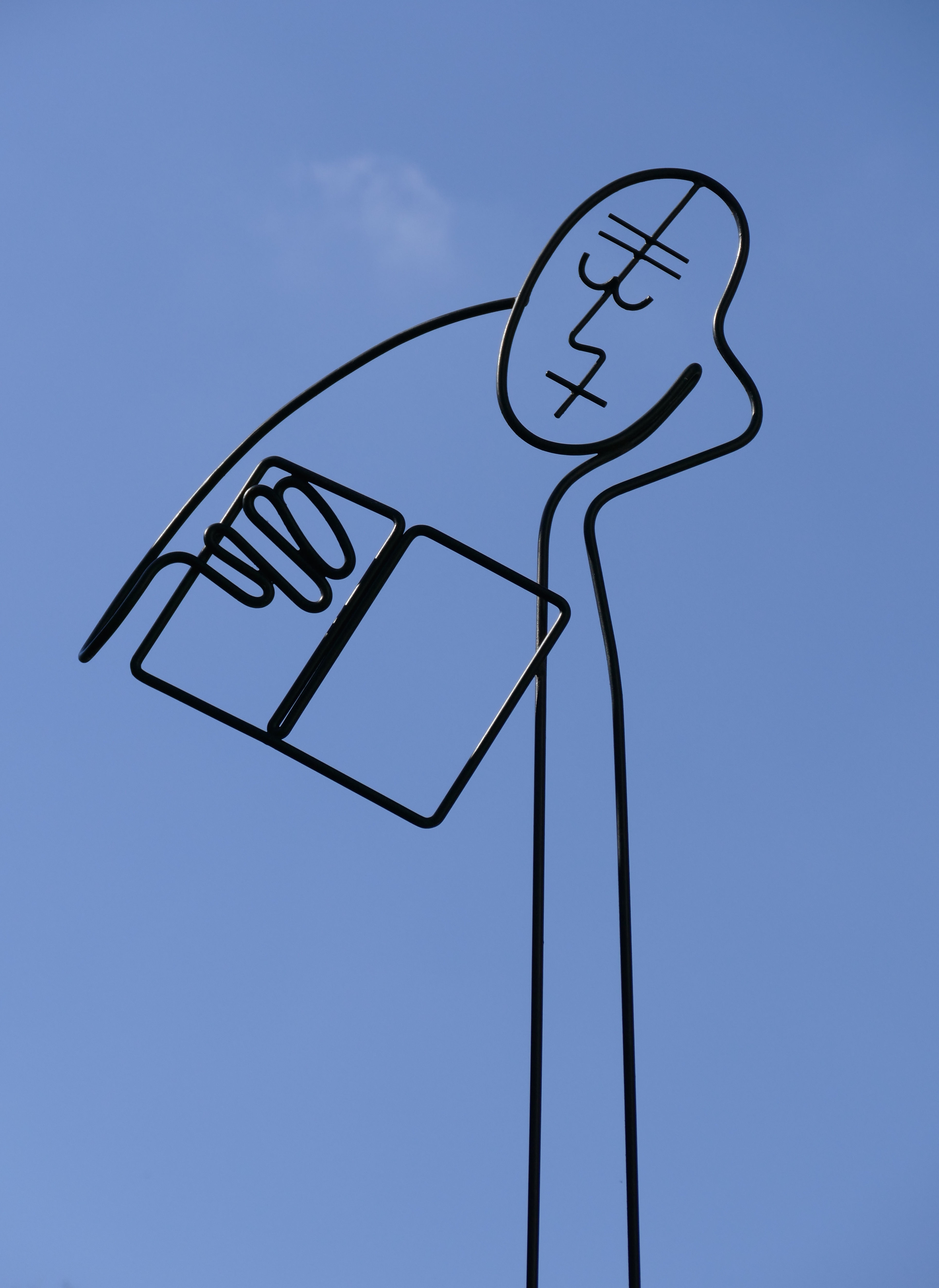 Lyrik Kabinett - Figur des "Lesenden" über dem Eingangsportal von Hans Margulies - Nahaufnahme